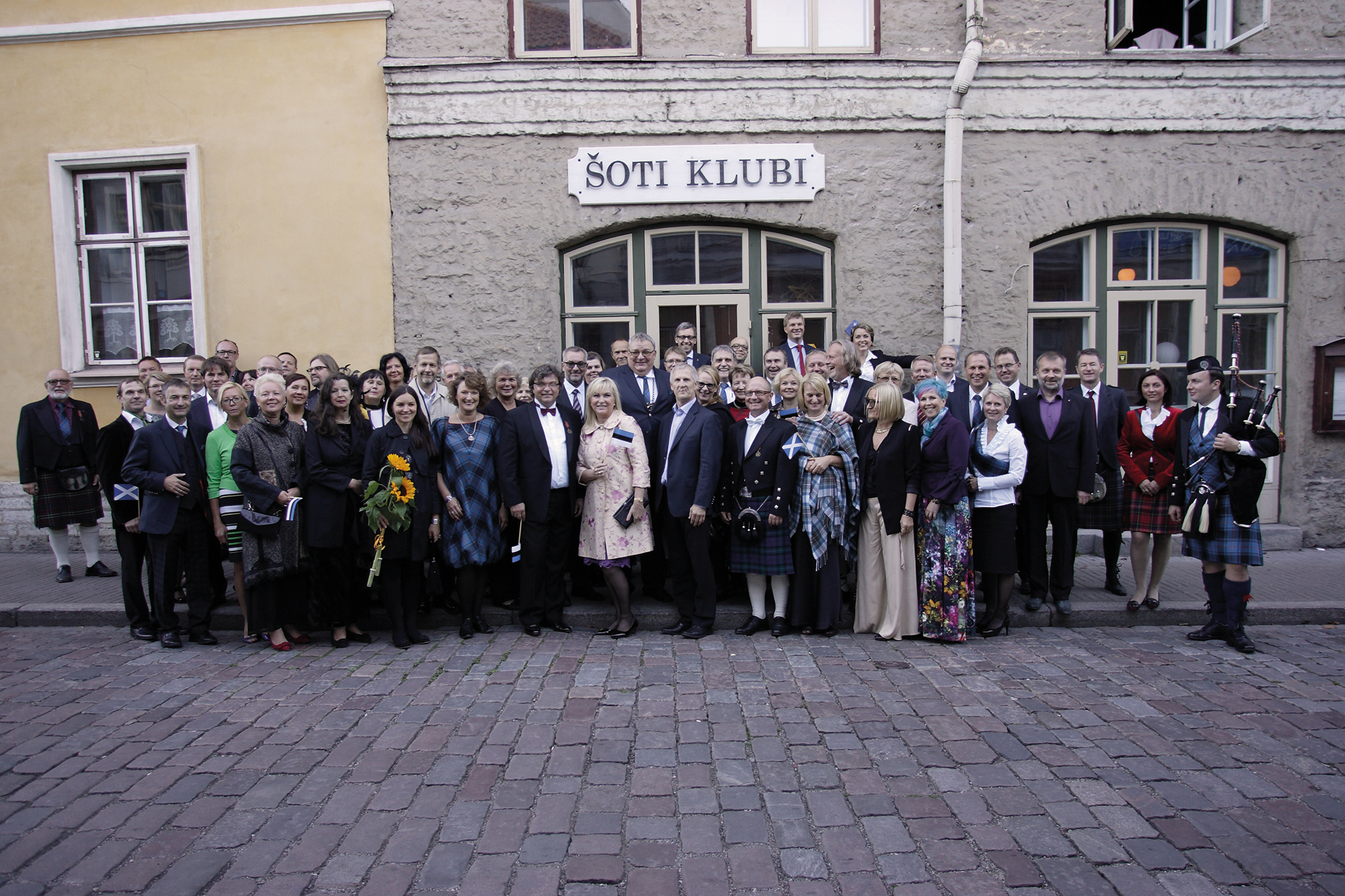 Šoti klubi 25 sünnipäev aastal 2018